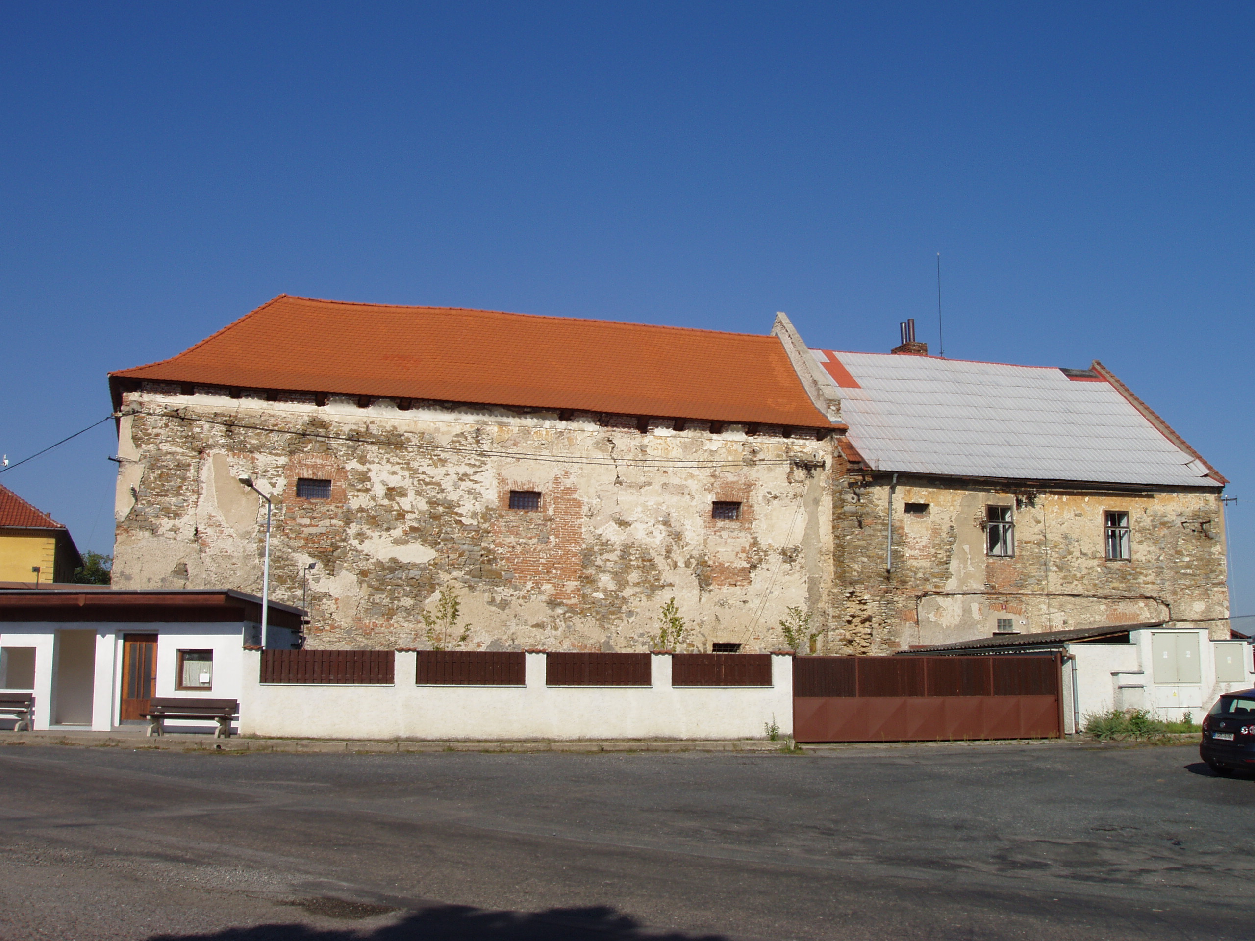 Tvrz (Nebovidy), Nebovidy 31